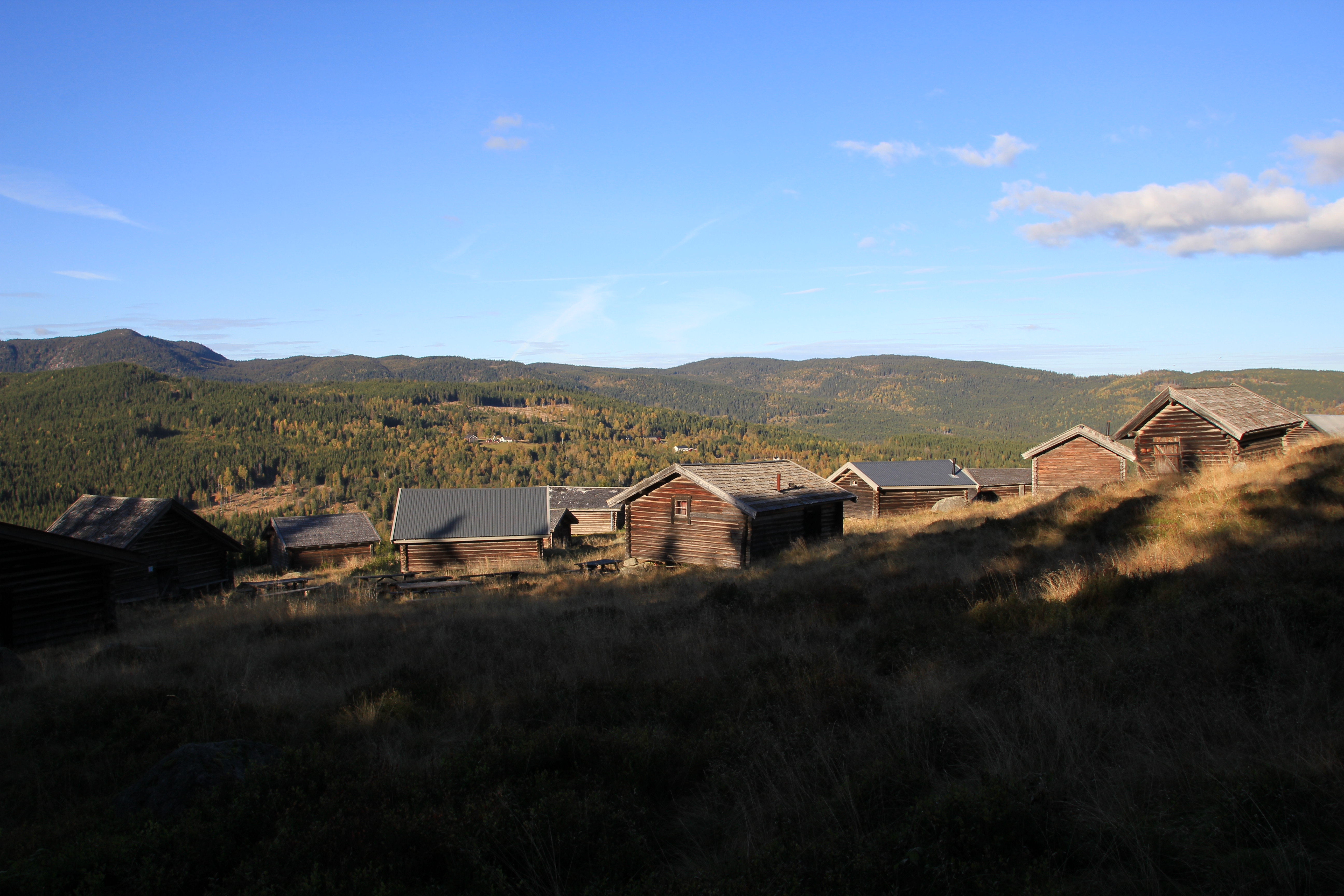 Knaisætra er den best bevarte setra i Akershus, beliggende i Hurdal kommune.